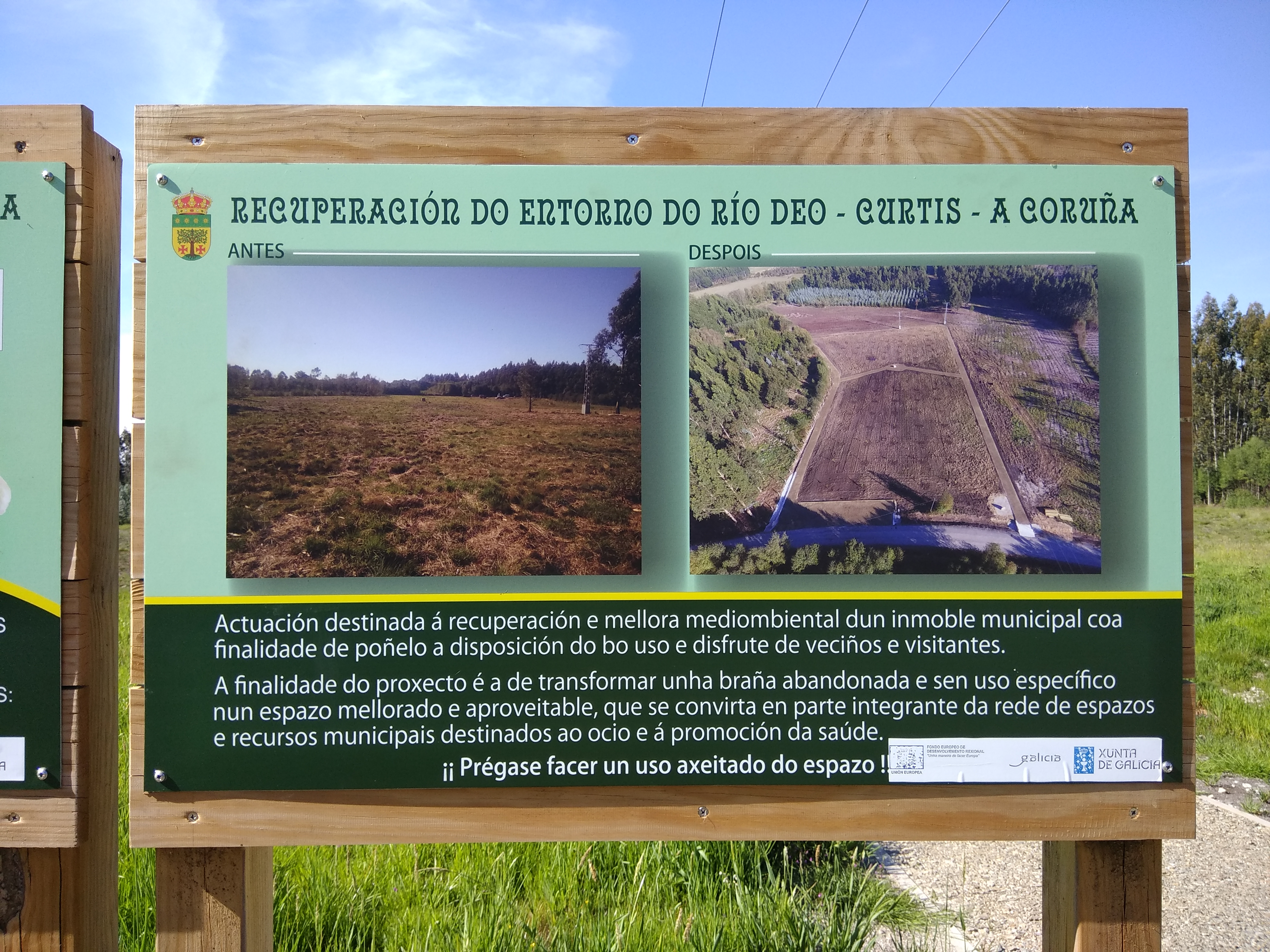 Actuación destinada á recuperación da contorna do río Deo realizada nunha braña de Curtis en 2018.